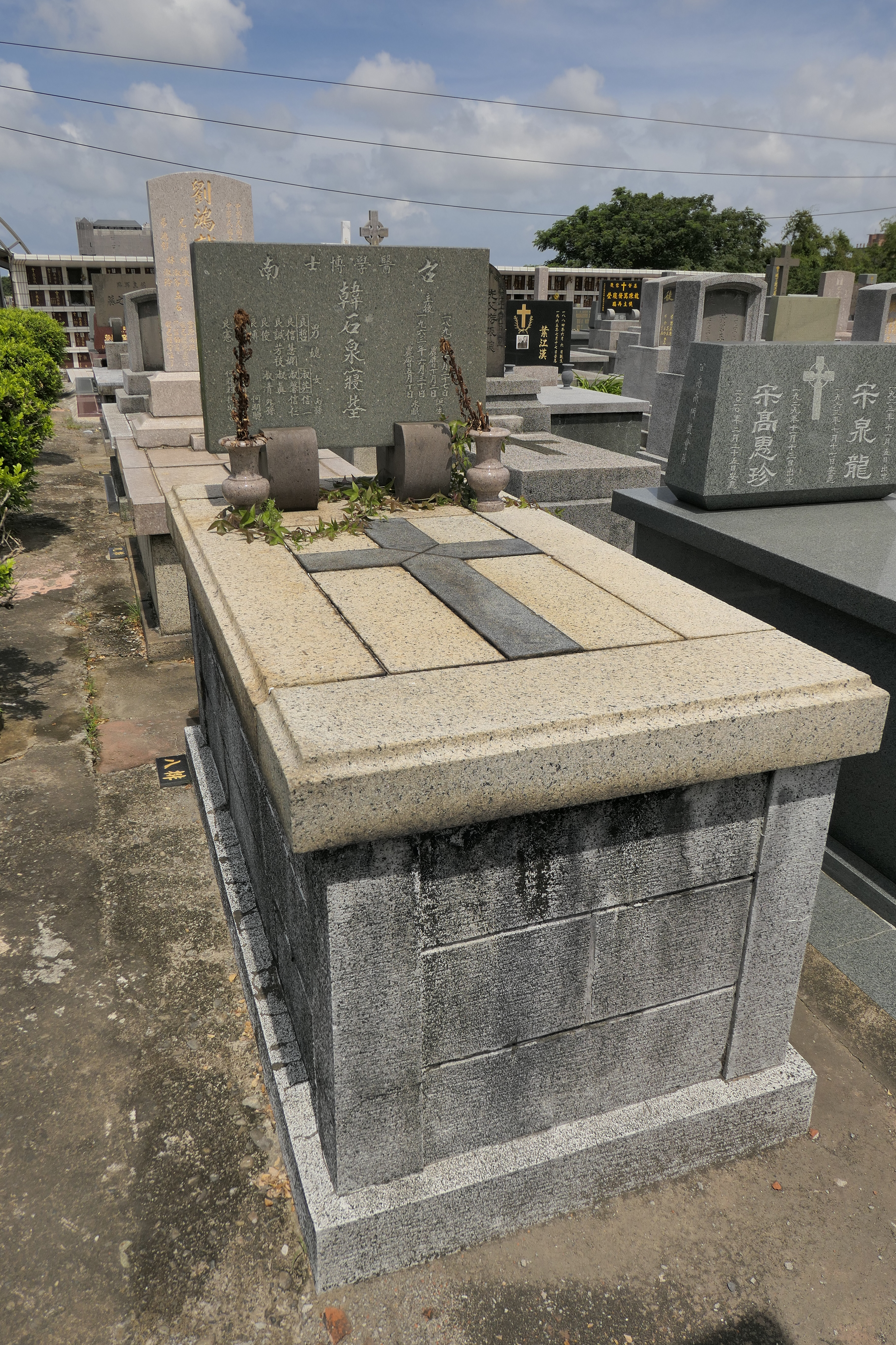 韓石泉墓，位在基督教墓地